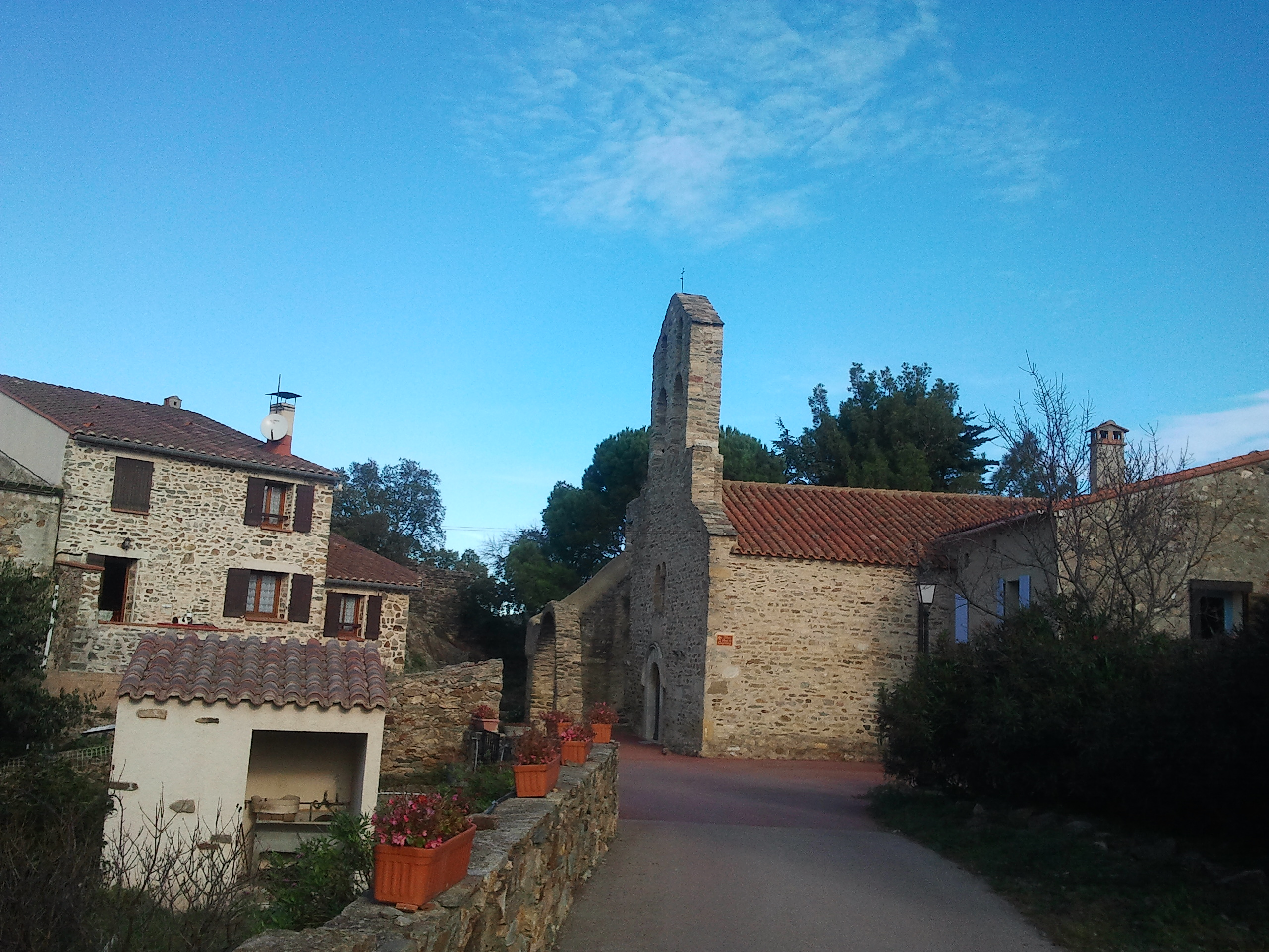 La place Ponç de Capmany à La Cluse Haute